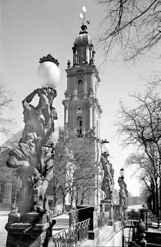 Potsdam.- Garnisonkirche von der Breiten Brücke